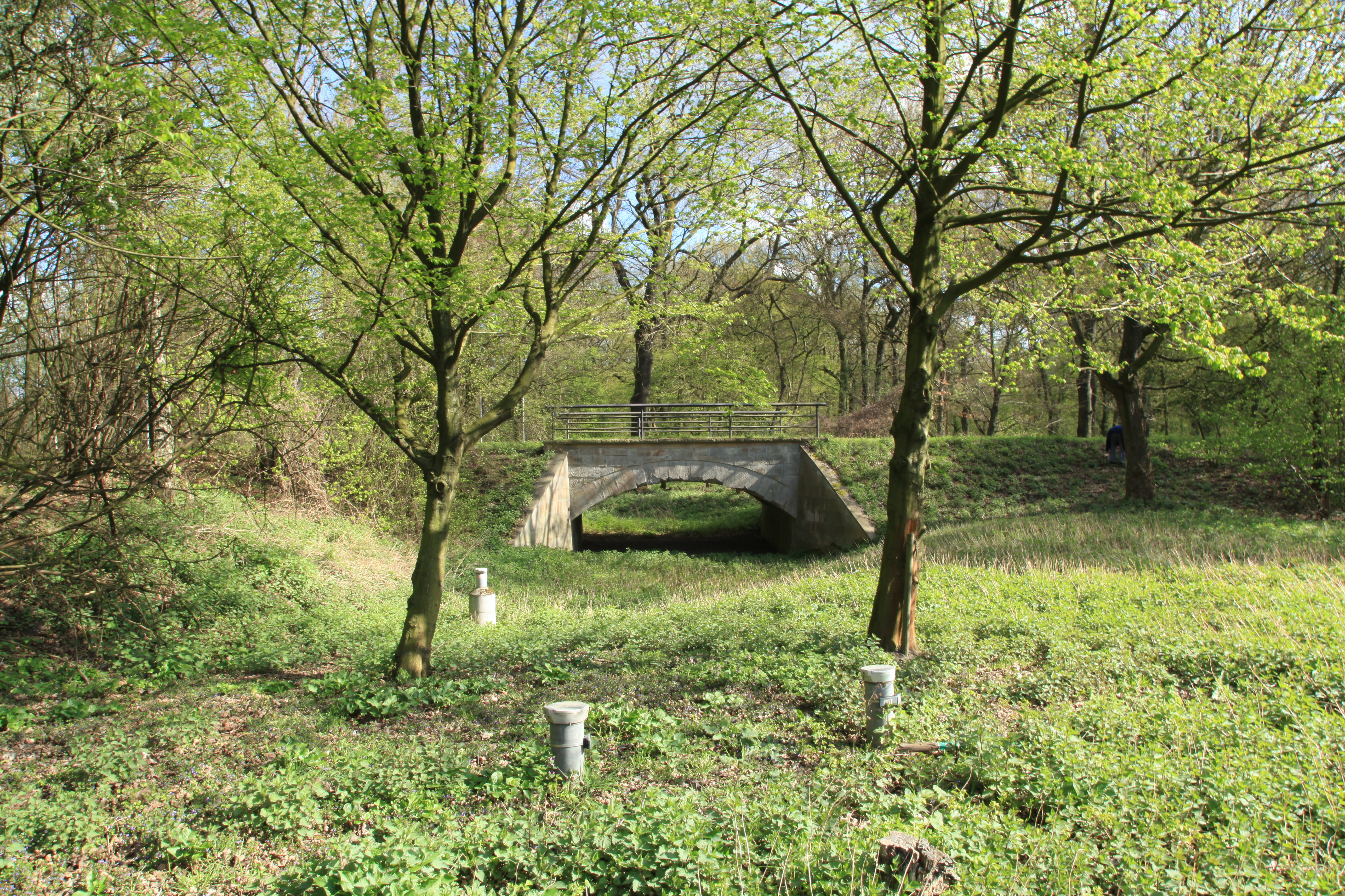 Fleuthebrücke an der Willy-Brandt-Allee, Grenze von Gelsenkirchen und Herne